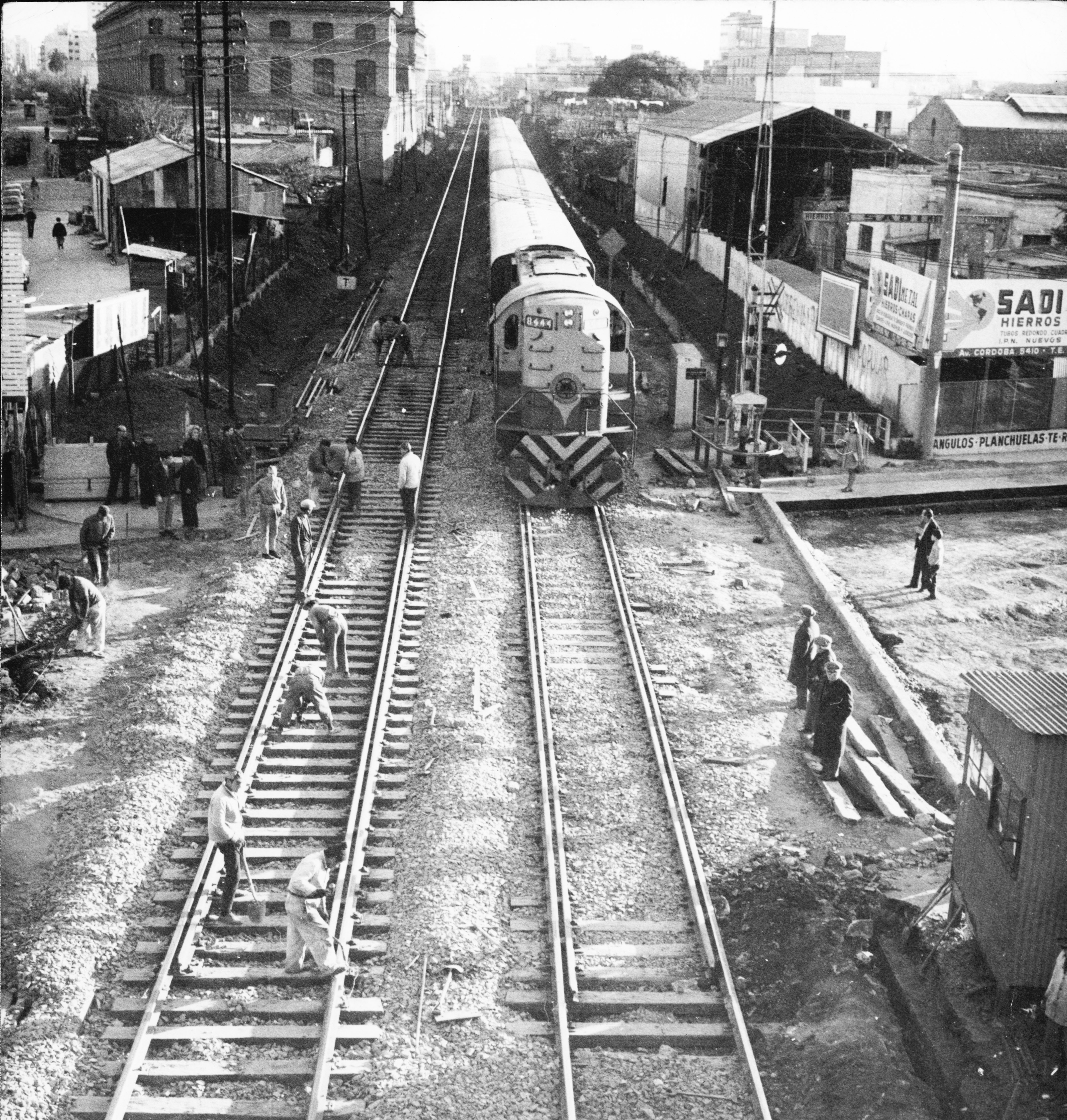 Buenos Aires. Vías del ferrocarril General San Martín, en las calles Córdoba y Juan B Justo, 1969. Inventario 303970. General Archive of the Nation Native nameArchivo General de la Nación ArgentinaLocationBuenos Aires, ArgentinaCoordinates34° 36′ 17″ S, 58° 22′ 14″ W Established28 August 1821Web pageAGNAuthority control : Q2860529 ISNI: 0000 0001 2375 5869 institution QS:P195,Q2860529 This file, was provided to Wikimedia Commonsthanks to an agreement between the General Archive of the Nation of Argentina and Wikimedia Argentina.